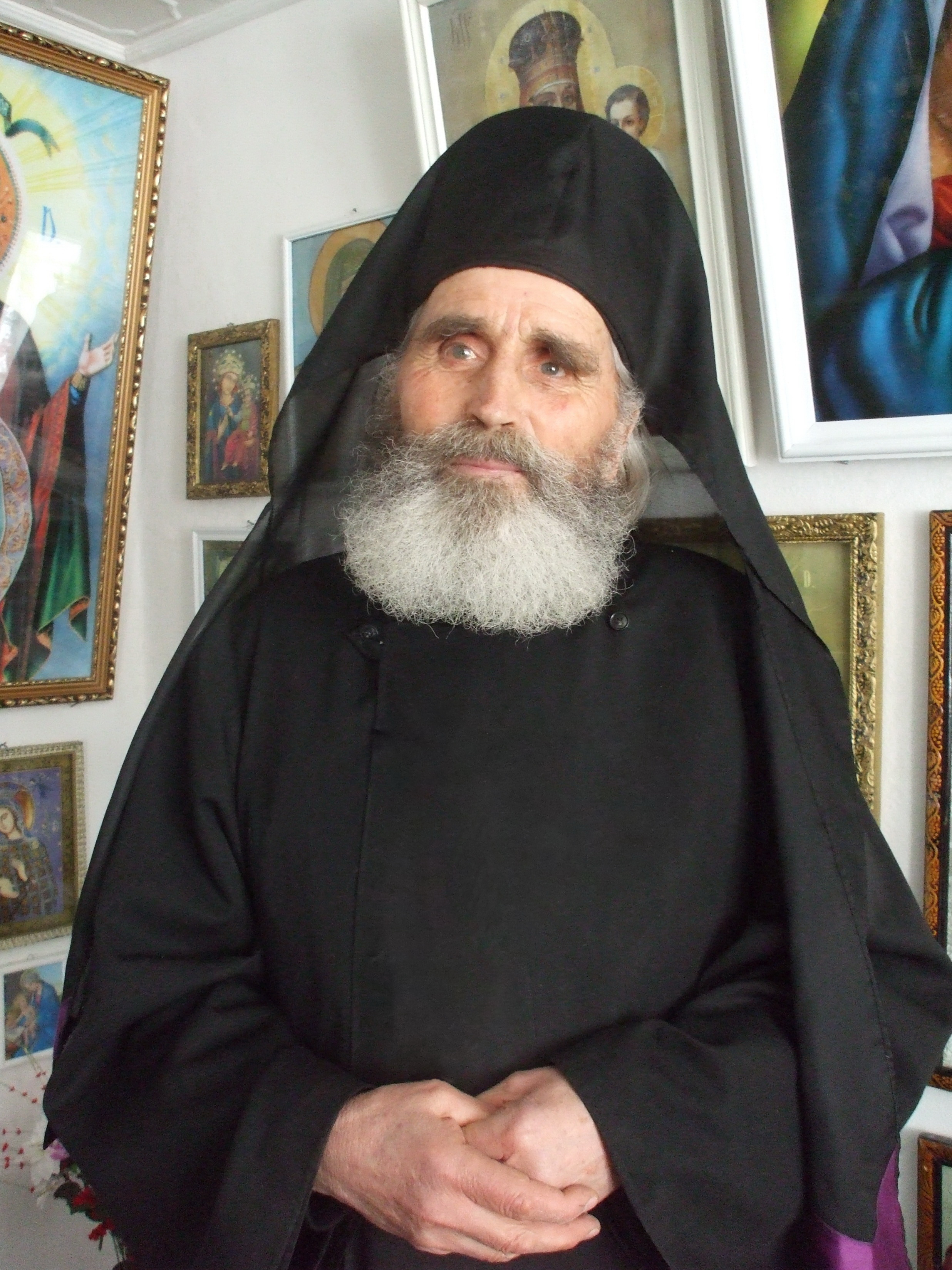 Parintele sebastian de la corod1